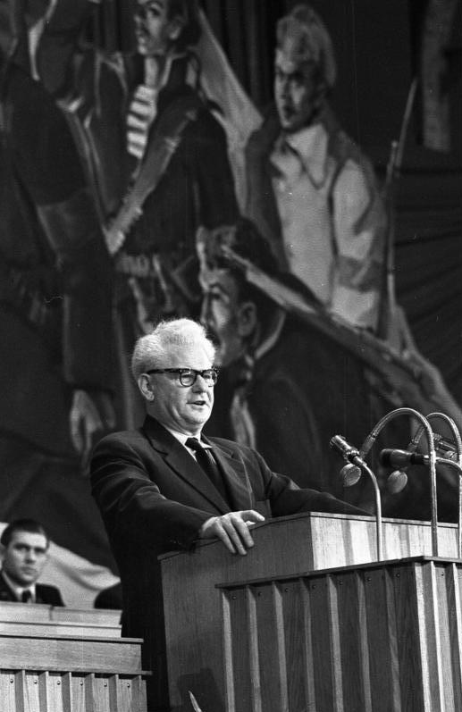 Jahrestag der Oktoberrevolution, Hermann Matern Zentralbild/ 3.11.1957/ Festveranstaltung zum 40. Jahrestag der Oktoberrevolution Zu Ehren des 40. Jahrestages der Großen Sozialistischen Oktoberrevolution führten das ZK der SED, der Ministerrat der Deutschen Demokratischen Republik und der Nationalrat der Nationalen Front des Demokratischen Deutschland am 3. November 1957 in der Berliner Werner-Seelepbinder-Halle eine Festveranstaltung durch. UBz: Während der Ansprache von Hermann Matern, Mitglied des Politbüros des ZK der SED. Abgebildete Personen: Matern, Hermann: Vizepräsident der Volkskammer, Mitglied des ZK der SED, DDR (PND 118578812)